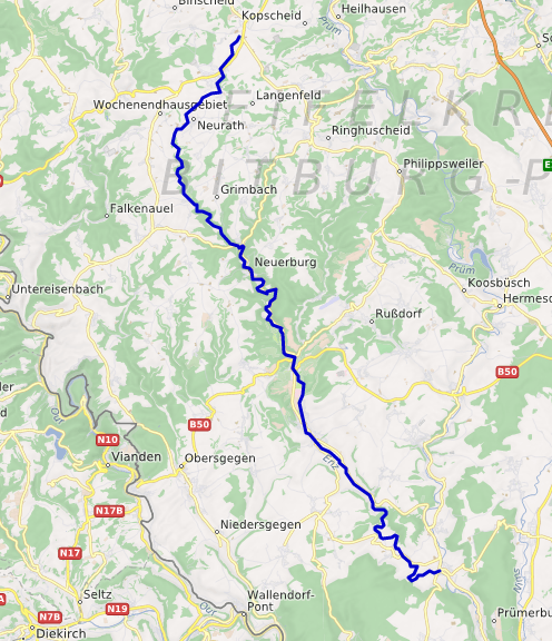 carte réalisée sur umap This map may be incomplete, and may contain errors. Don't rely solely on it for navigation.